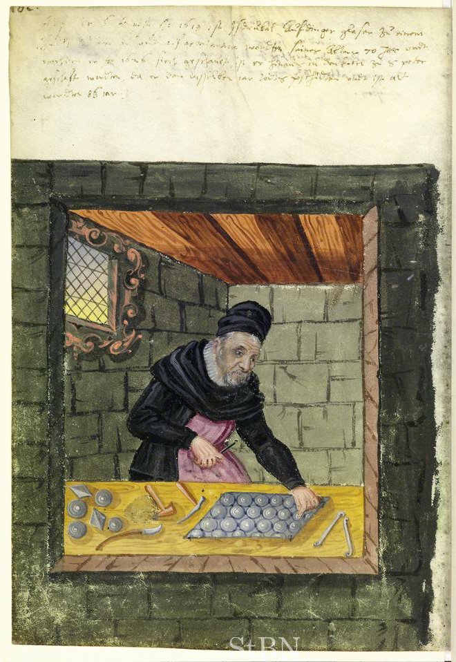 Transkription und weitere Informationen Asdrubal (Hasdrubal) Aufdinger, glaser (Glaser)